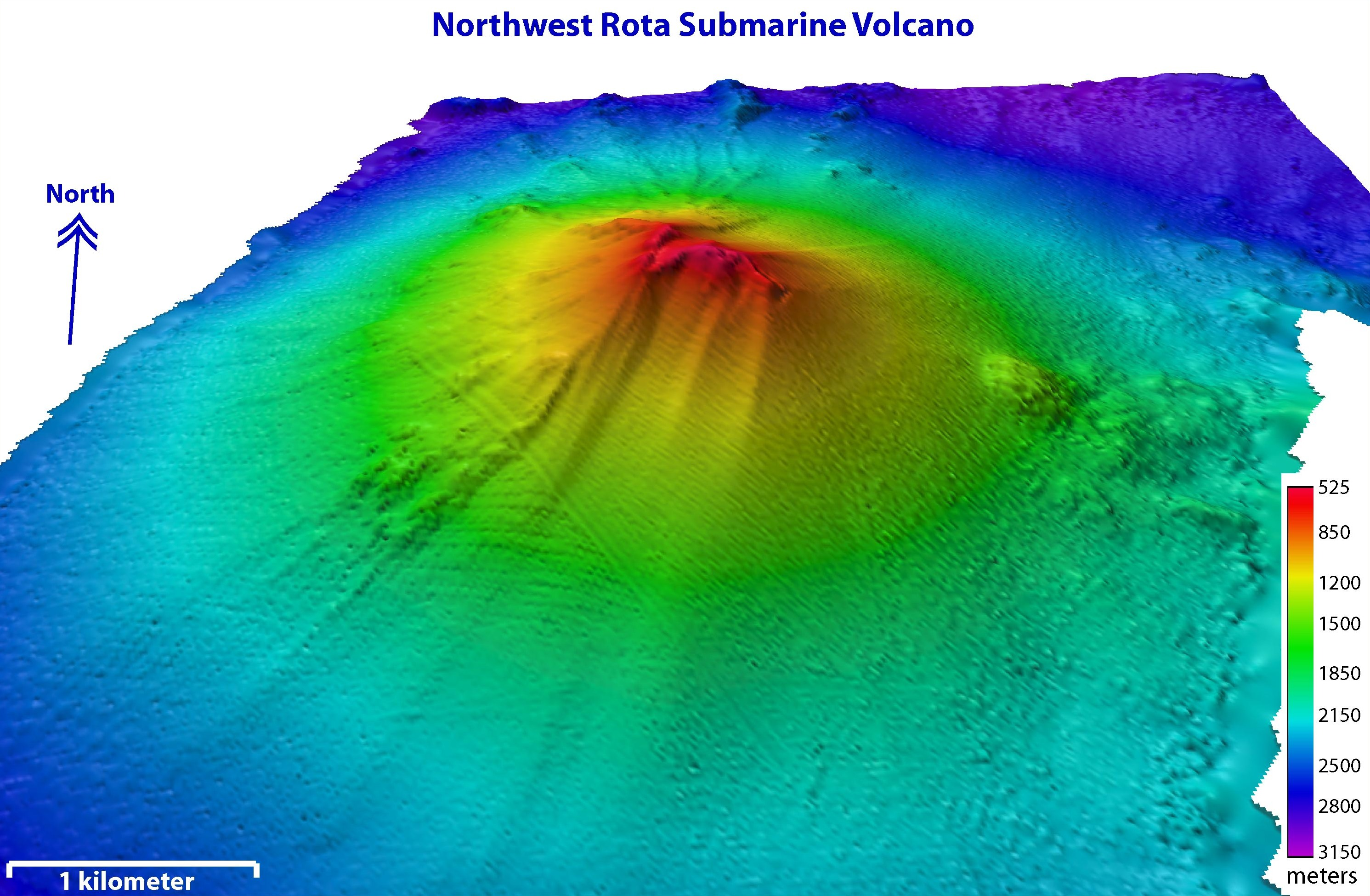 northwest rota volcano.